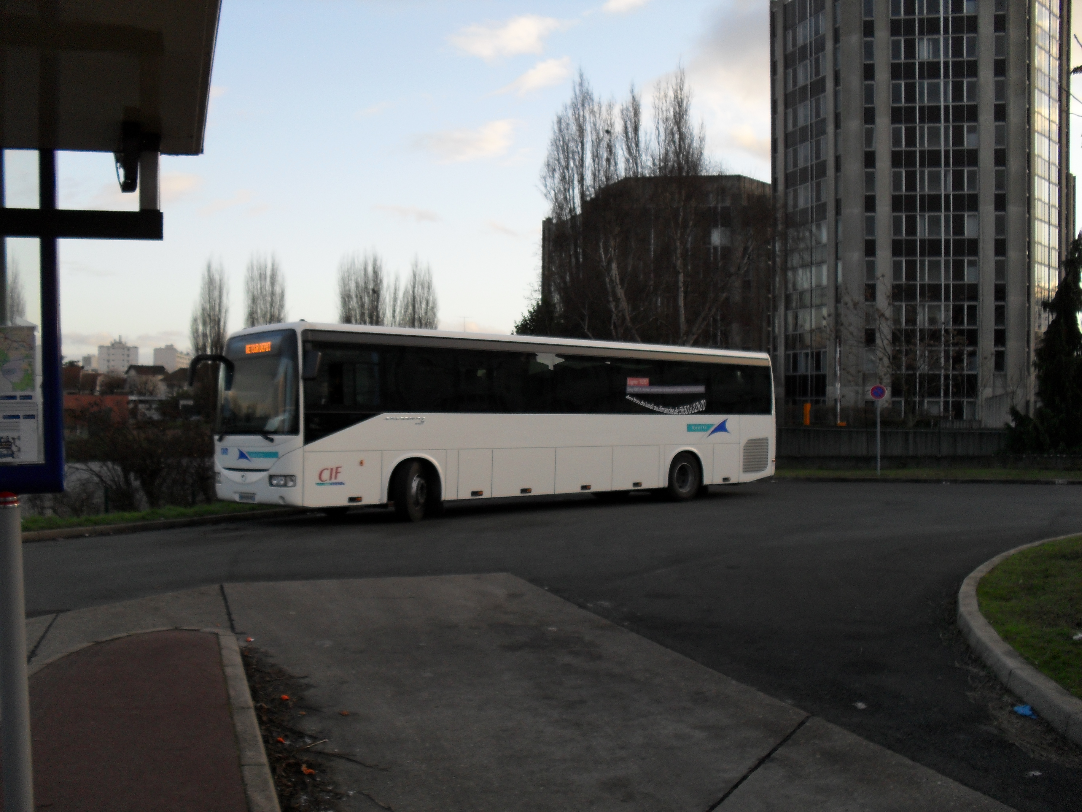 Irisbus Crossway CIF/VAS sur le 100